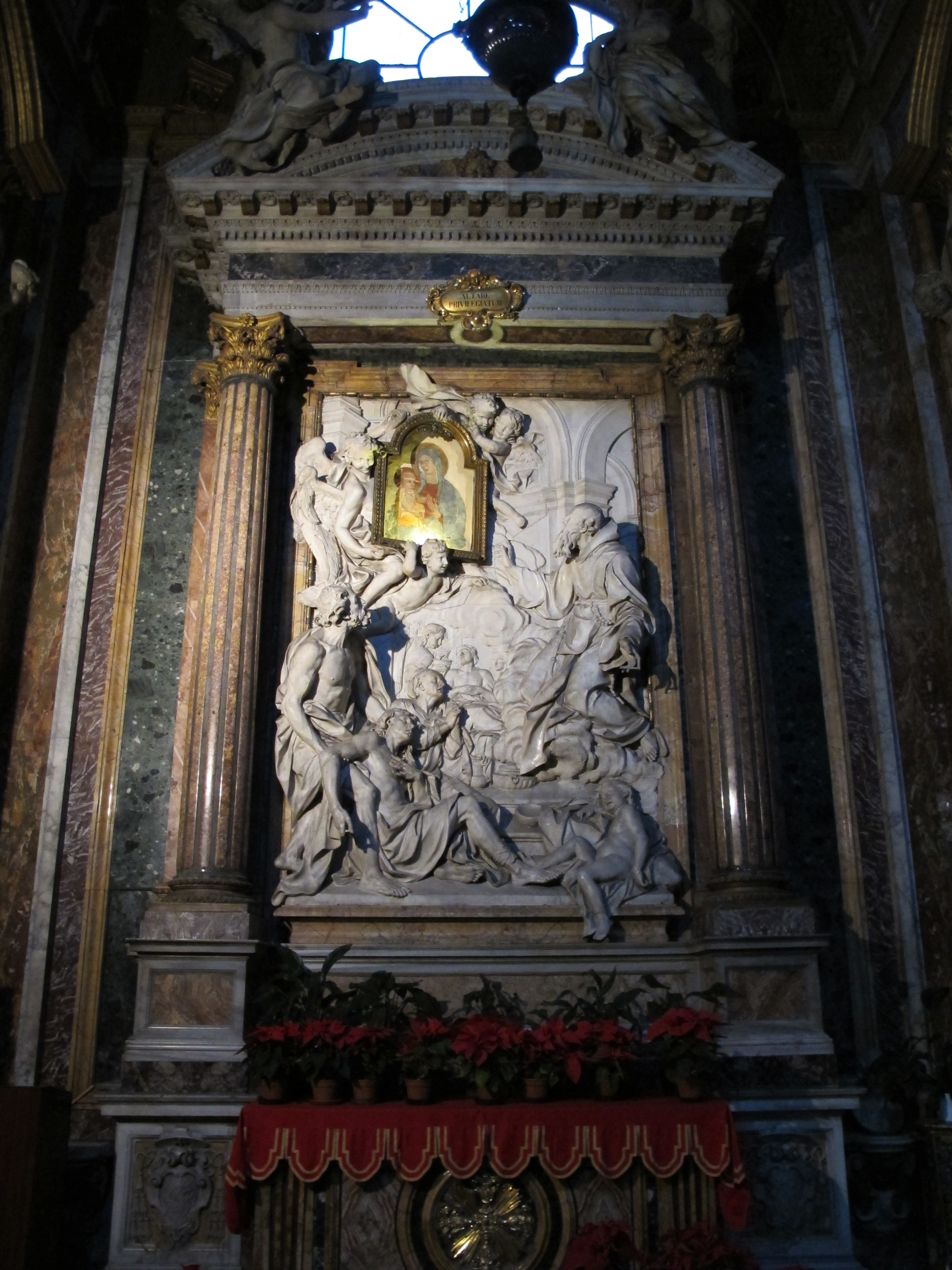 San giacomo in augusta, interno 04 madonna del 400 e altorilievo di le gross, 1704